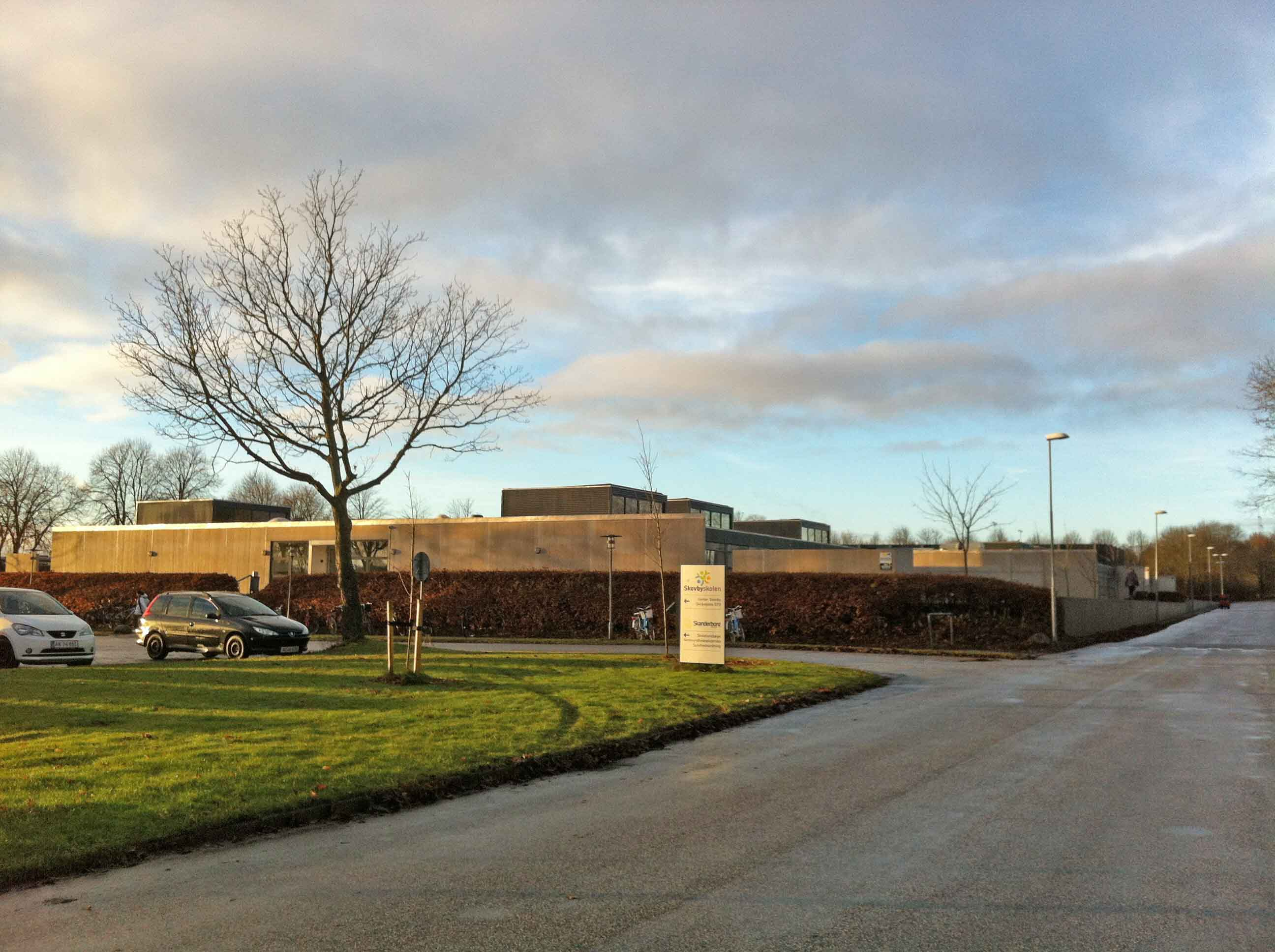 Skovbyskolen